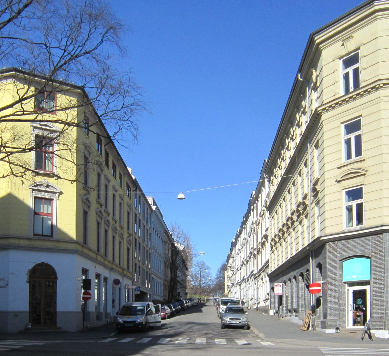 Huitfeldts gate sett fra Løkkeveien